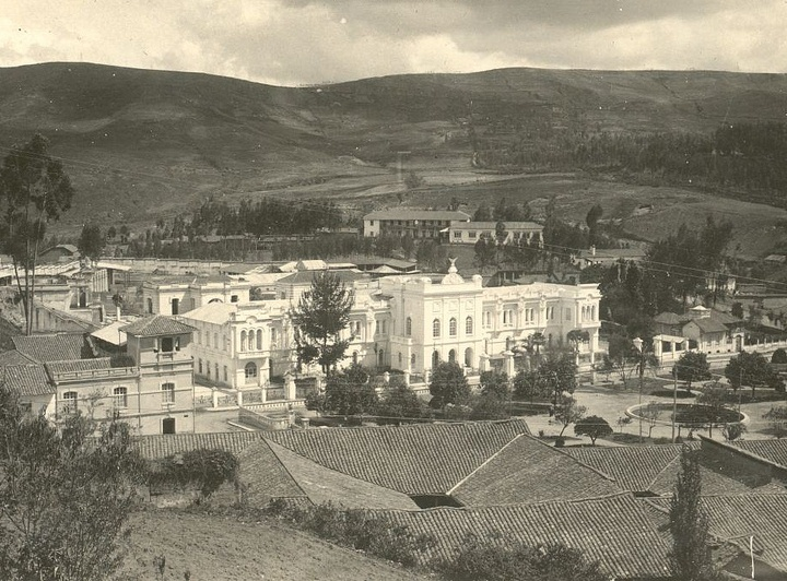 Vista general del sector de La Recoleta en 1915, donde destaca el Palacio de La Exposición después de haber sido reconstruída su fachada central, tras el terremoto de 914 que hizo venirse abajo la cúpula.